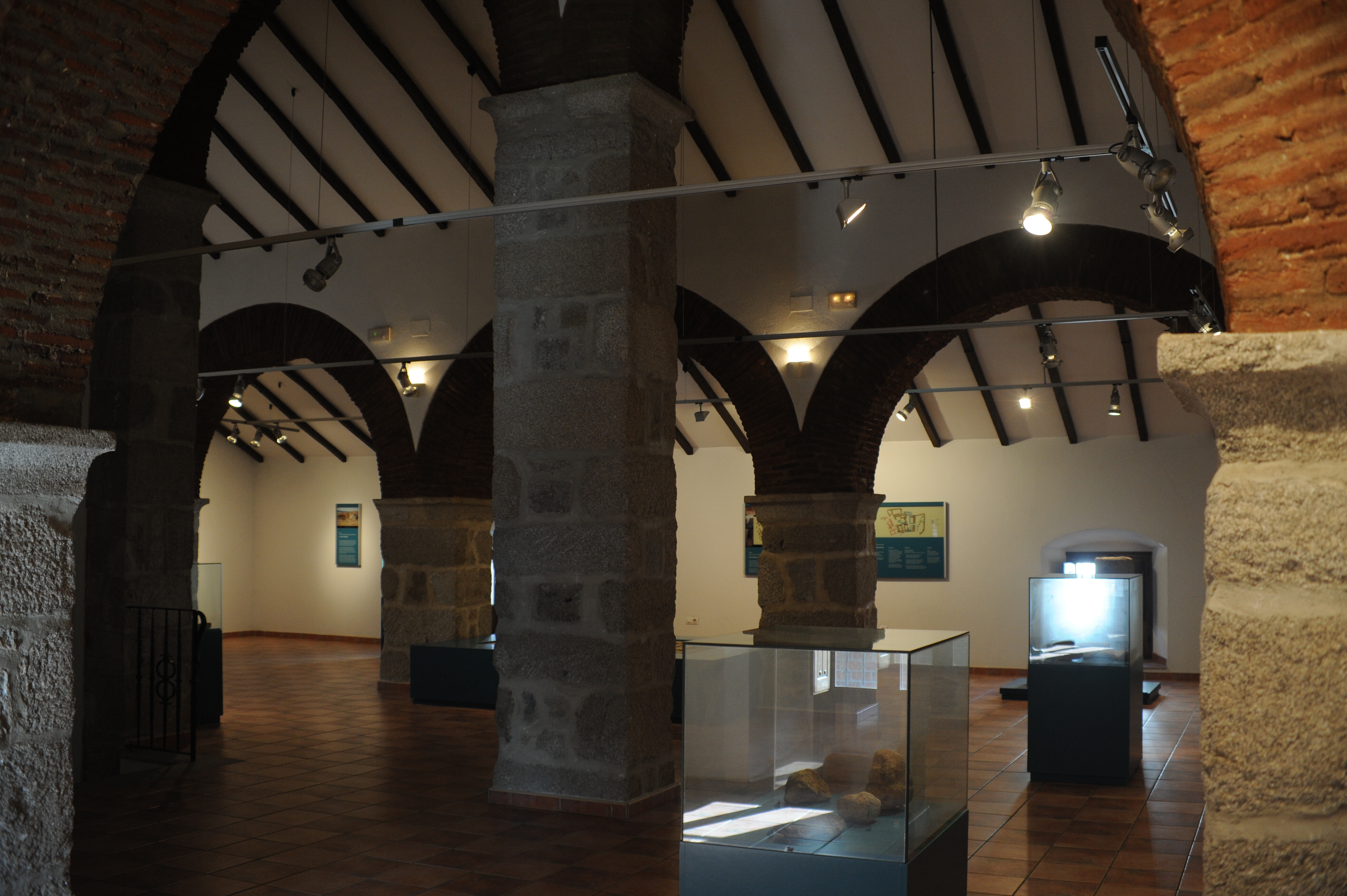 fotografia del Museo del Granito